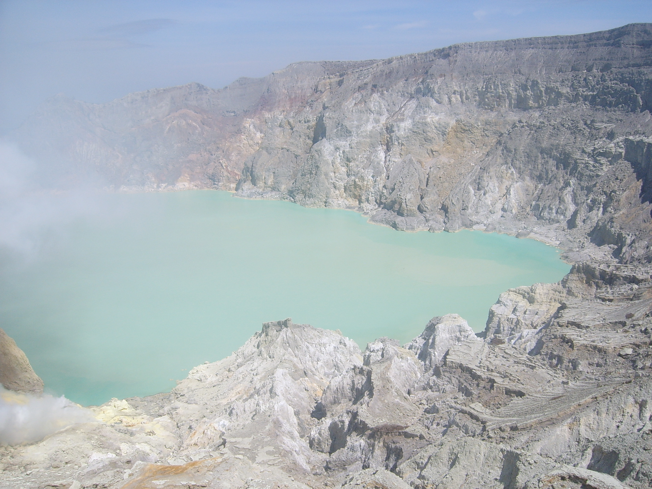 Ijen volcano